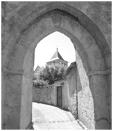 Village de Cénac, commune de Sainte-Croix